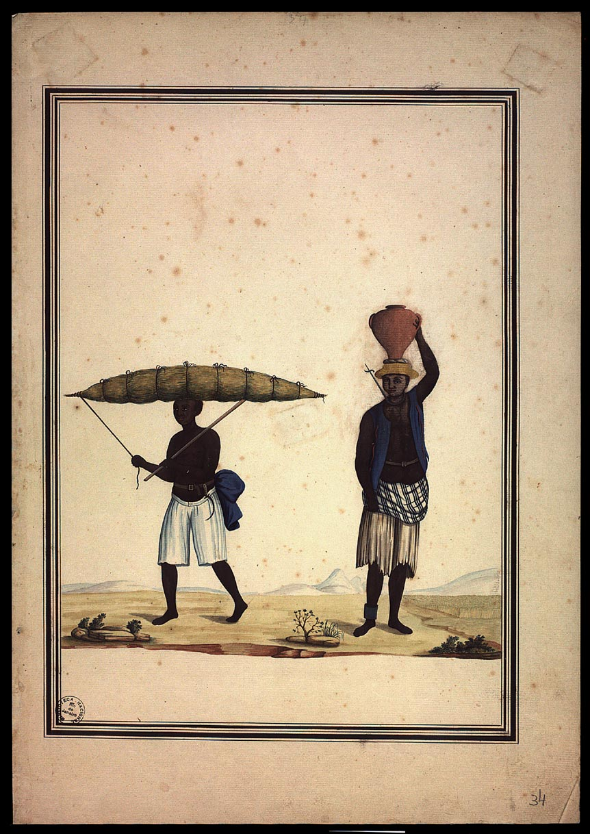 Escravo vendedor de capim, vestido de calção, casaco preso na cintura. Na cabeça, feixe de capim amarrado em vários pontos. Outro, vendedor de leite, de calção, pano na cintura e colete. Pote de barro na cabeça. Colar de ferro no pescoço e argola de cativeiro na perna direita, indicando sendo escravo fujão.